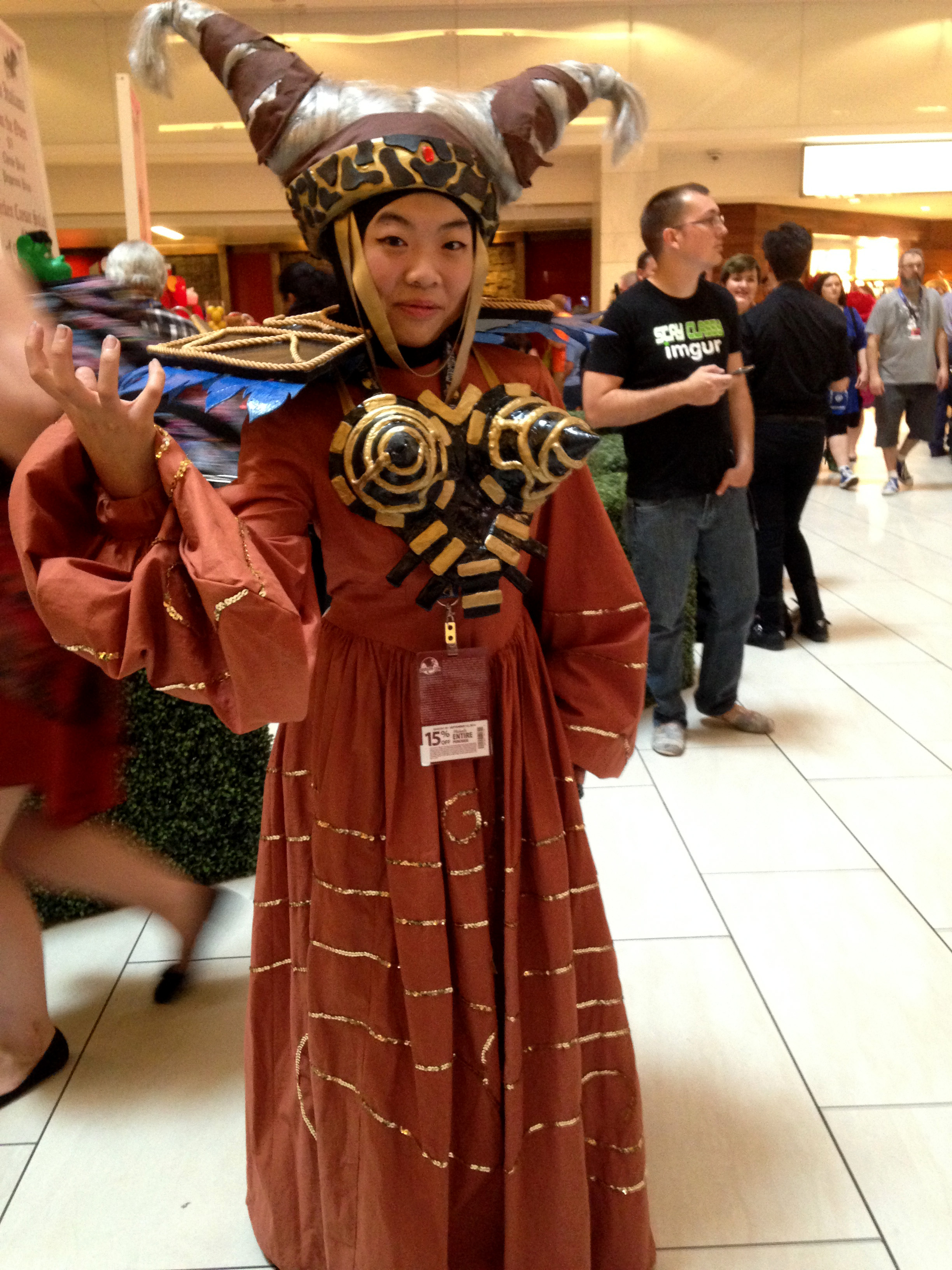 Cosplay at Dragon Con 2014.